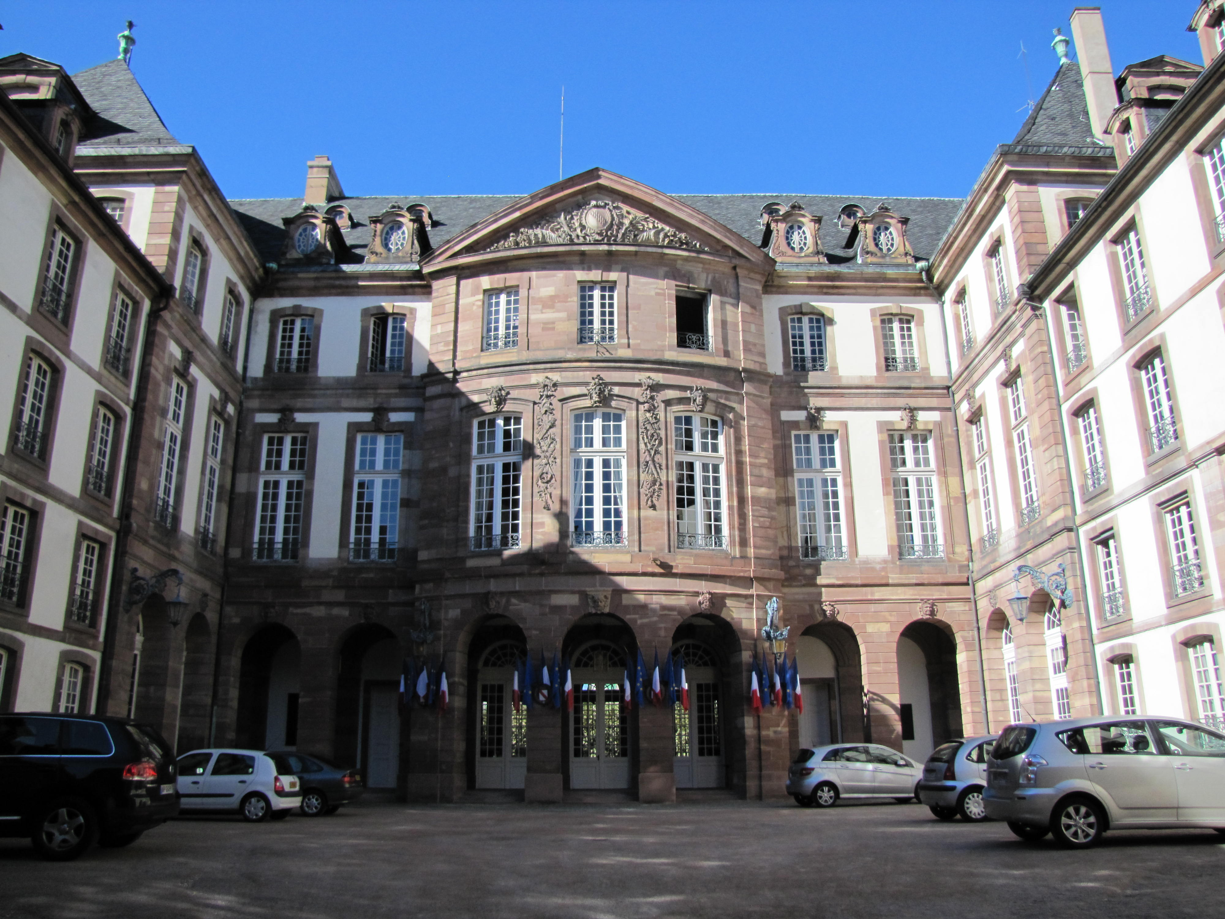 Alsace, Bas-Rhin, Strasbourg, Ancien Hôtel des Comtes de Hanau-Lichtenberg (1736), puis Hôtel de Ville, 9 rue Brûlée. .